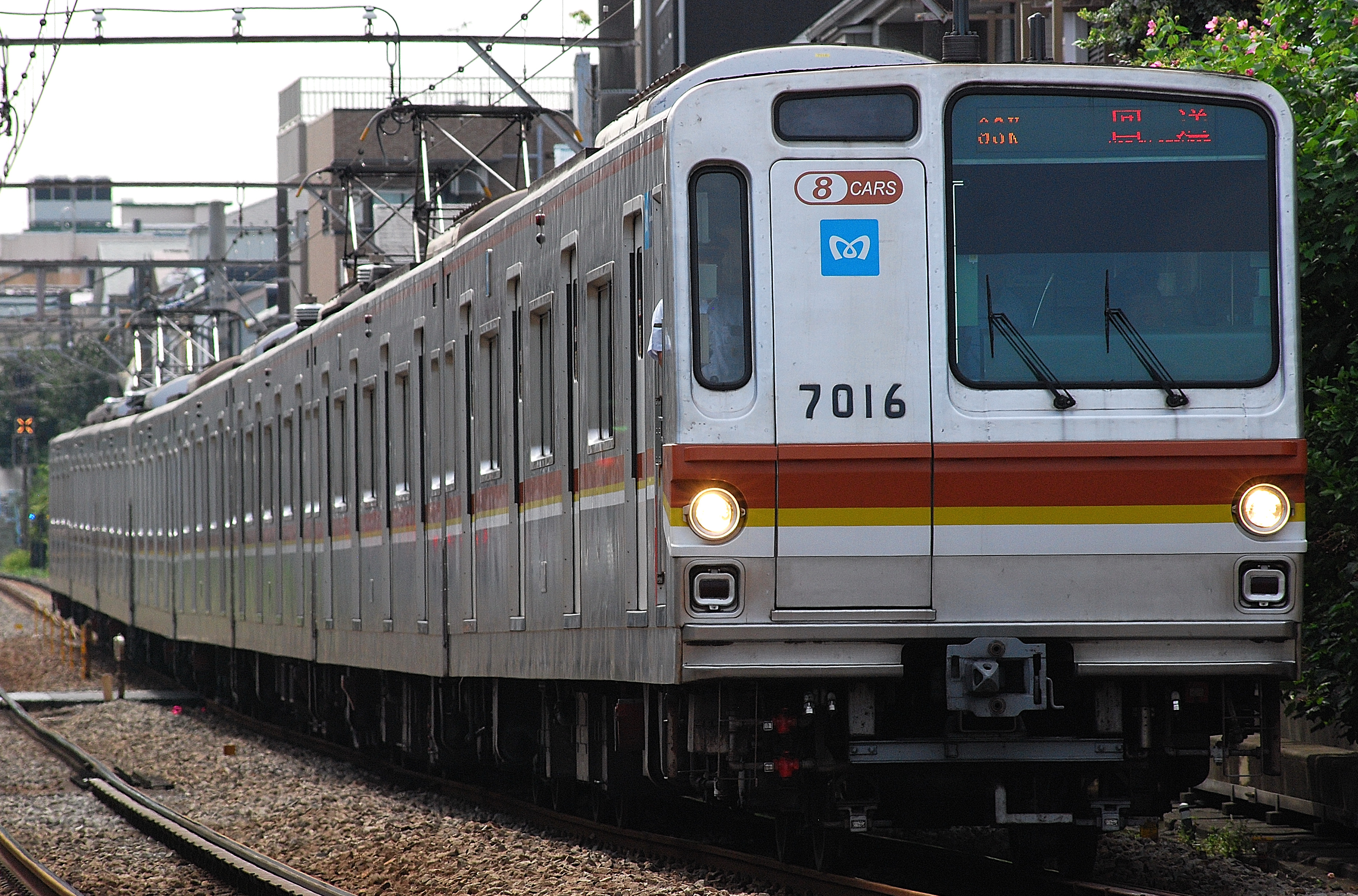 東急東横線を試運転列車として走行する東京メトロ7000系第16編成。（白楽-妙蓮寺）